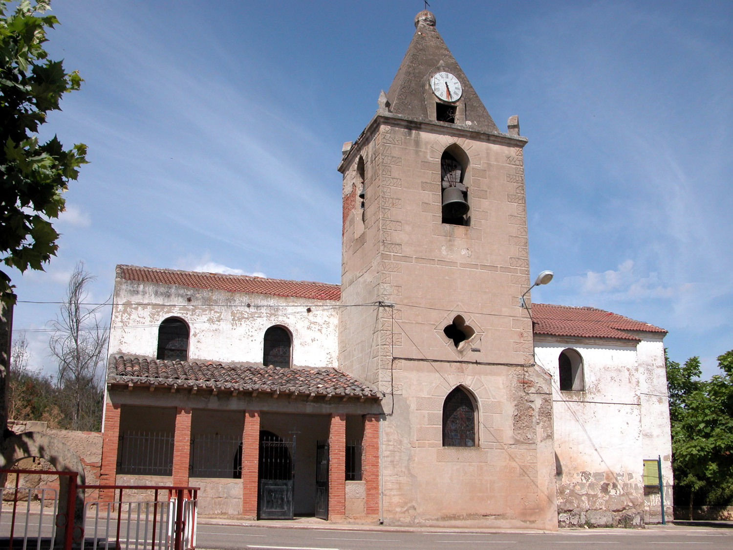 Iglesia de San Andrés en Cirueña, La Rioja (España).